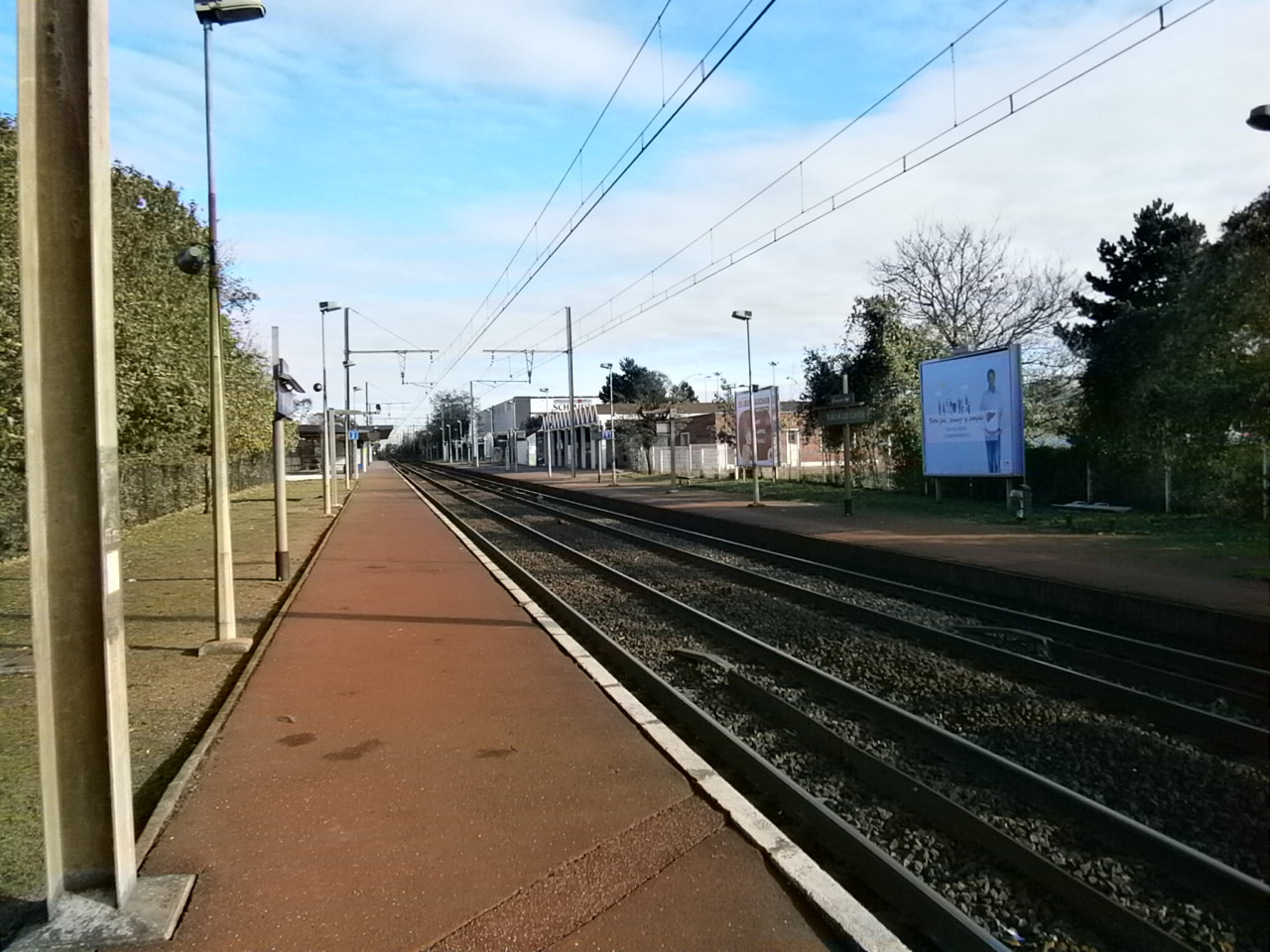 Gare de Plaisir - Les Clayes (78) : Vue générale de la gare.